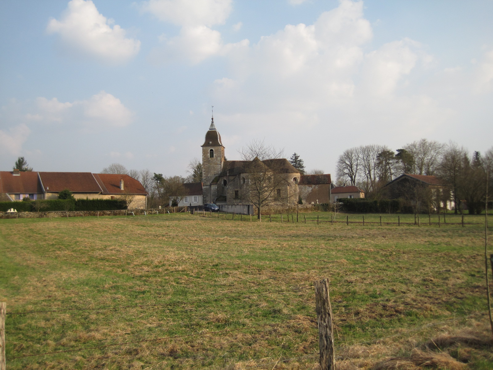 Eglise Saint-Maurice de Cirey-les-Bellevaux